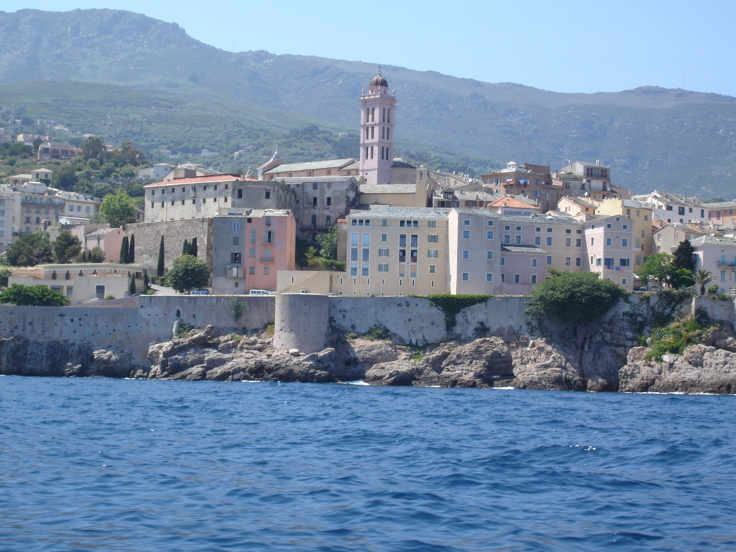 Citadelle de Bastia